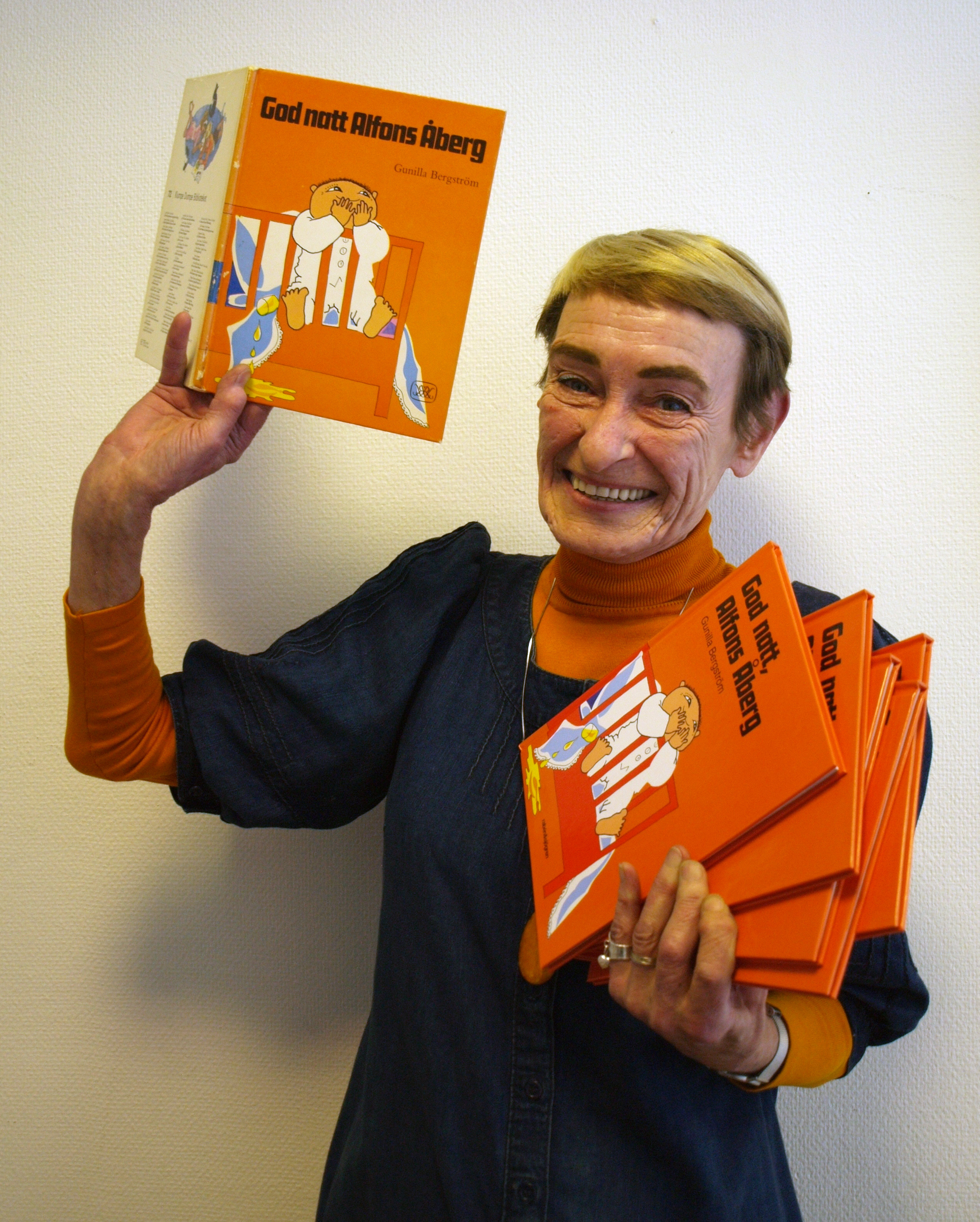 Författaren Gunilla Bergström med en hög exemplar av God natt, Alfons Åberg (1972). Boken var den första i serien om Alfons Åberg.